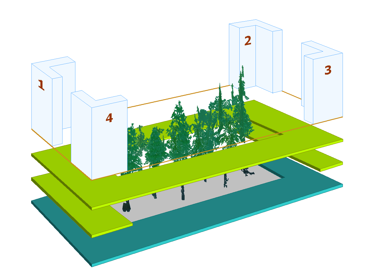 Bibliothèque nationale de France Site Tolbiac